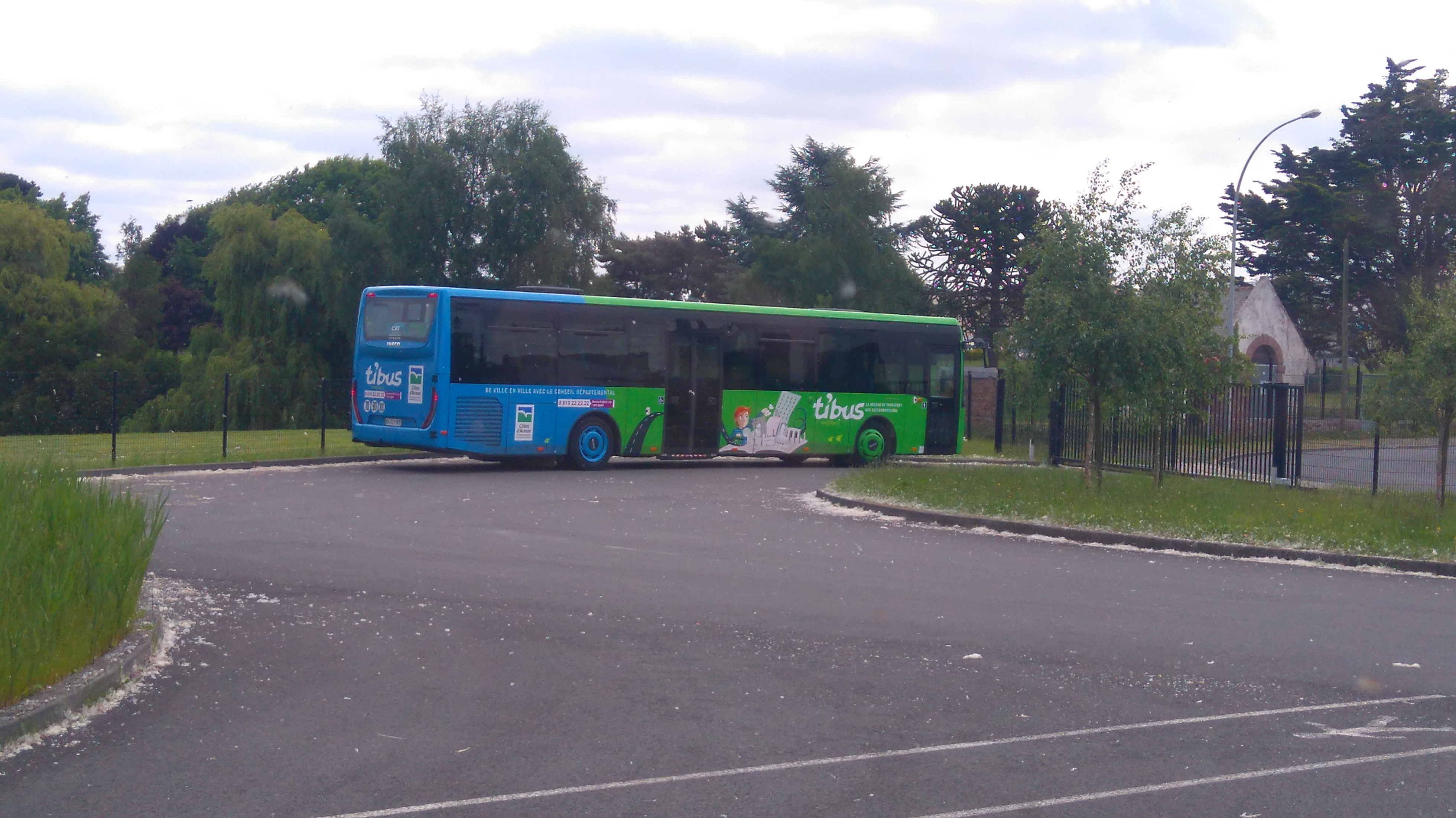 Iveco Bus Crossway LE - Ti'Bus